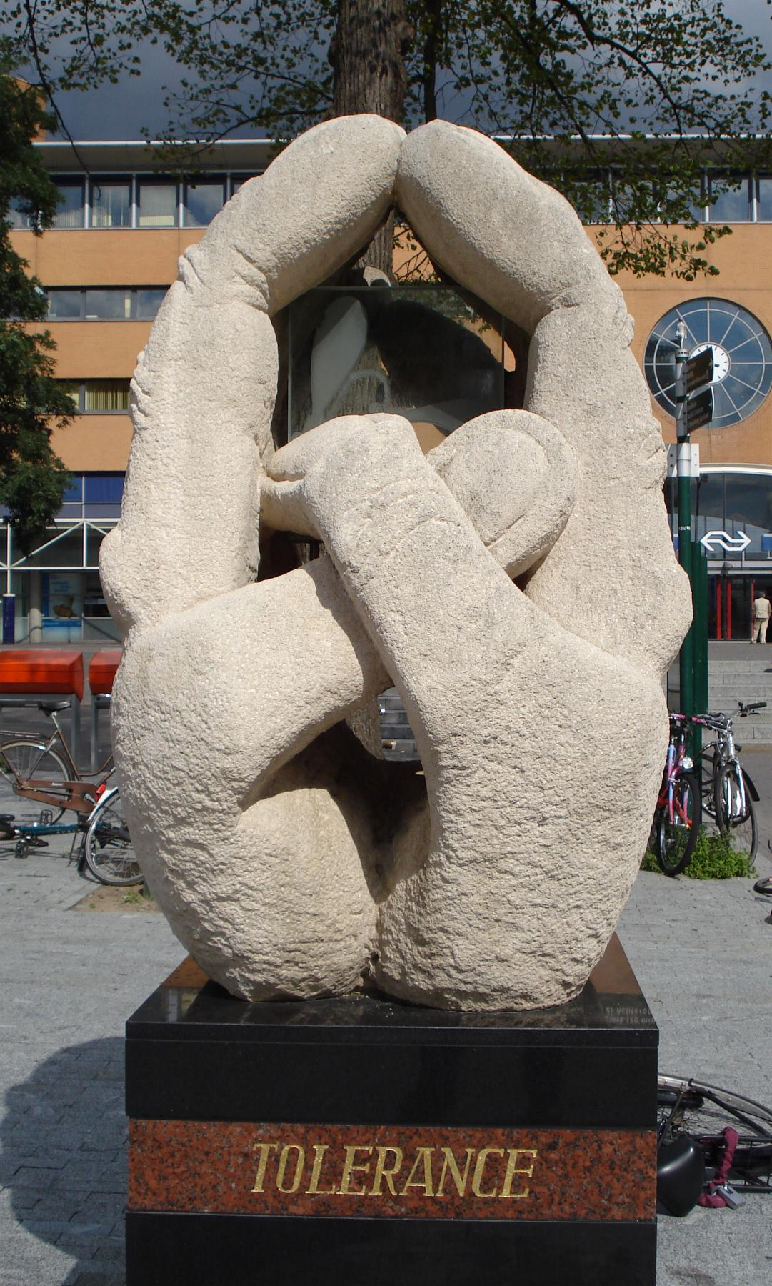 Hilversum, Stationsplein. Kunstwerk "Voor verdraagzaamheid" van Edo van Tetterode. Hilversum/The Netherlands.